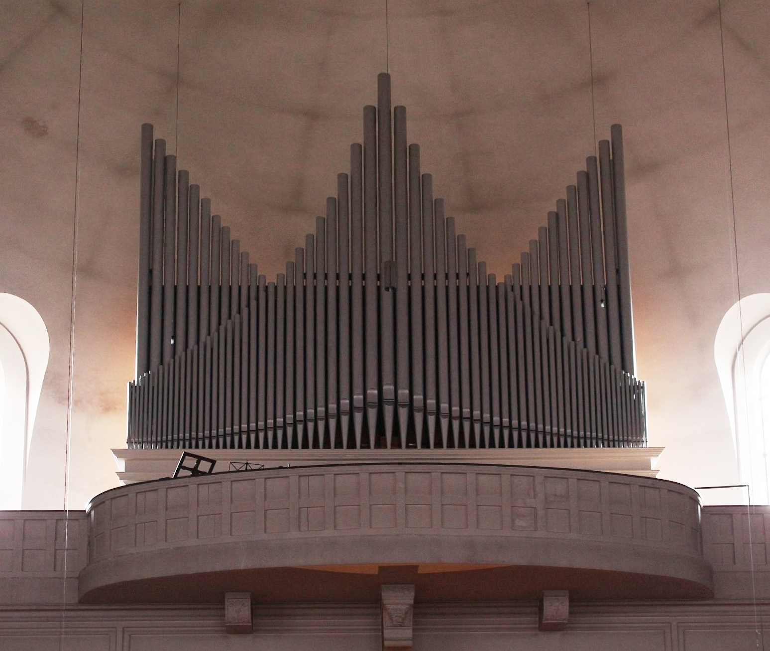 Orgel von St. Rupert in München (1907, F. B. Maerz, II/28)